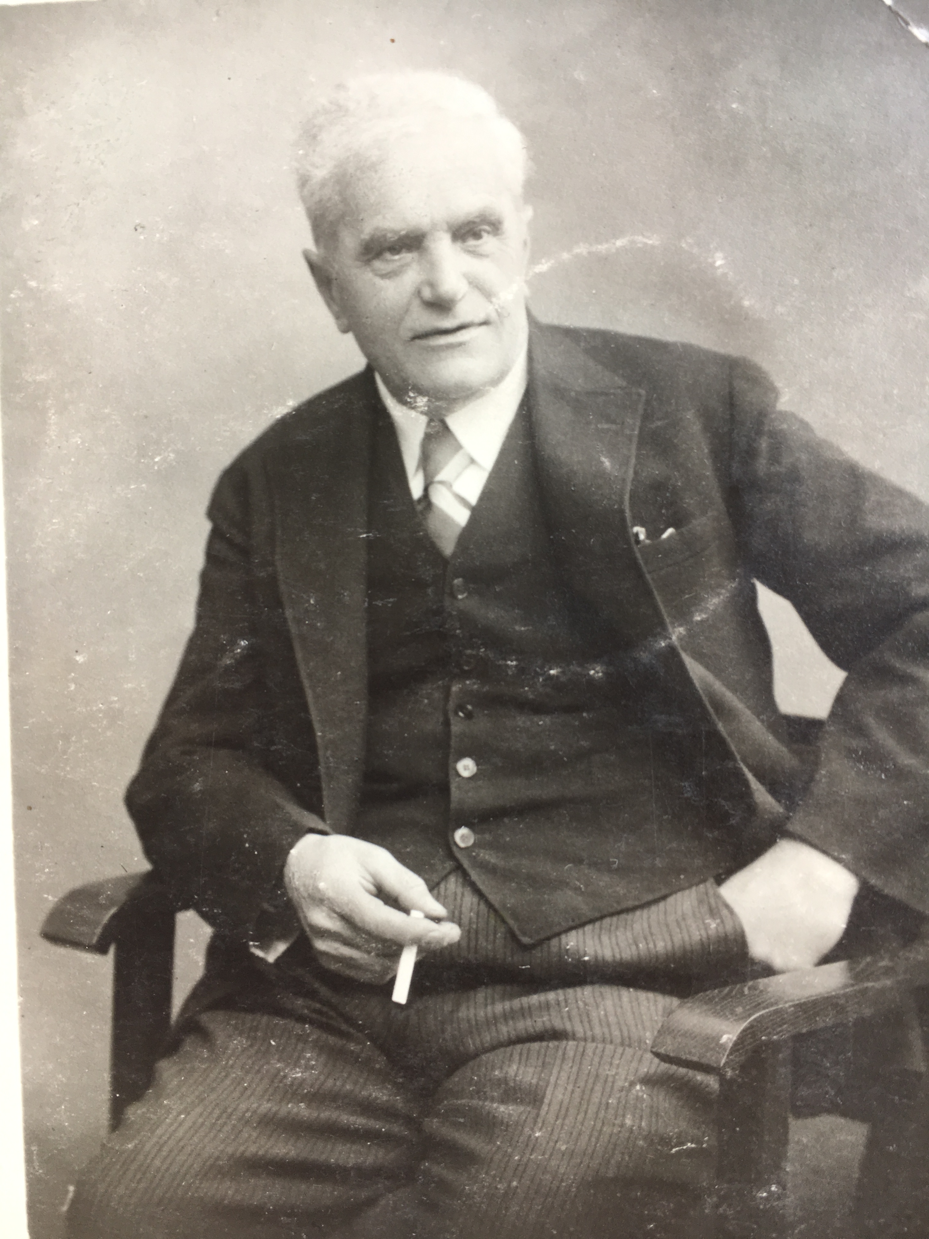 Josef Hladík (z rodinného archivu)